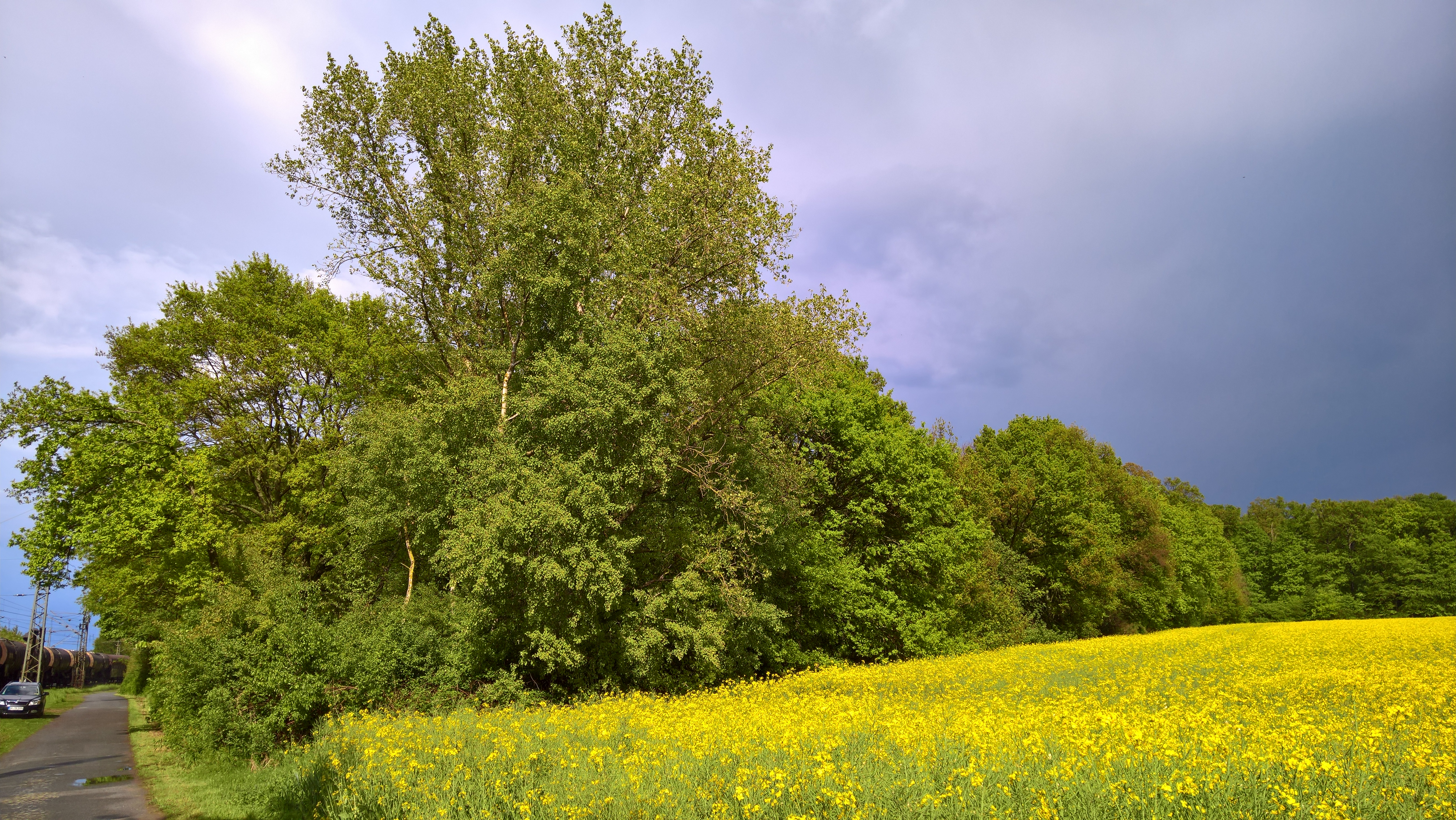 Das Naturdenkmal "Wasserfläche mit Gehölz und Schilf bei Darmstadt-Arheilgen" Teil Gewann "An der Kieskaute" südöstlich des Rangierbahnhofs Kranichstein